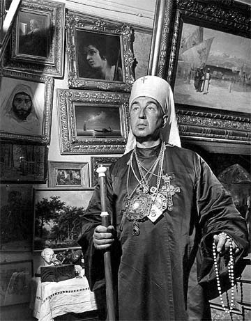 Глава обновленцев митрополит Александр Введенский 1941 год